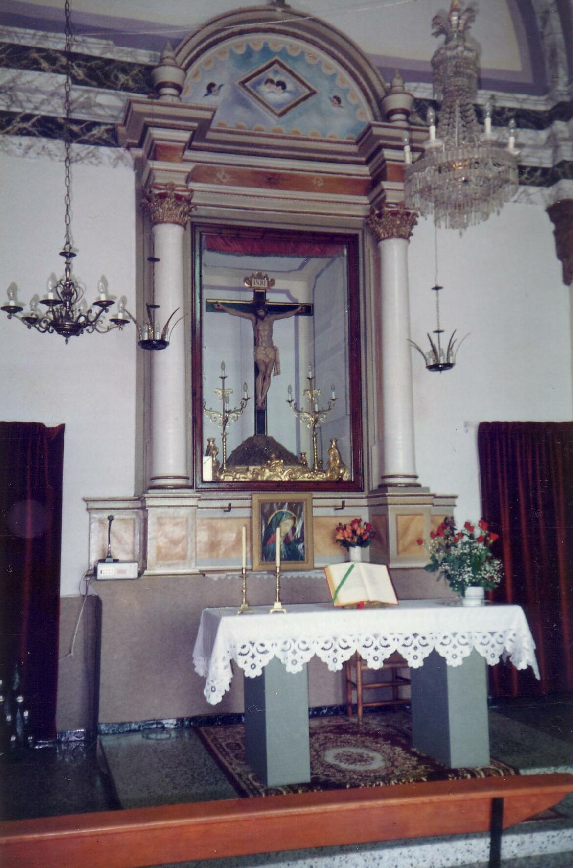 Vista del Altar, con la imagen del Santísimo Cristo de la Salud de Navarrés, municipio español perteneciente a la provincia de Valencia.